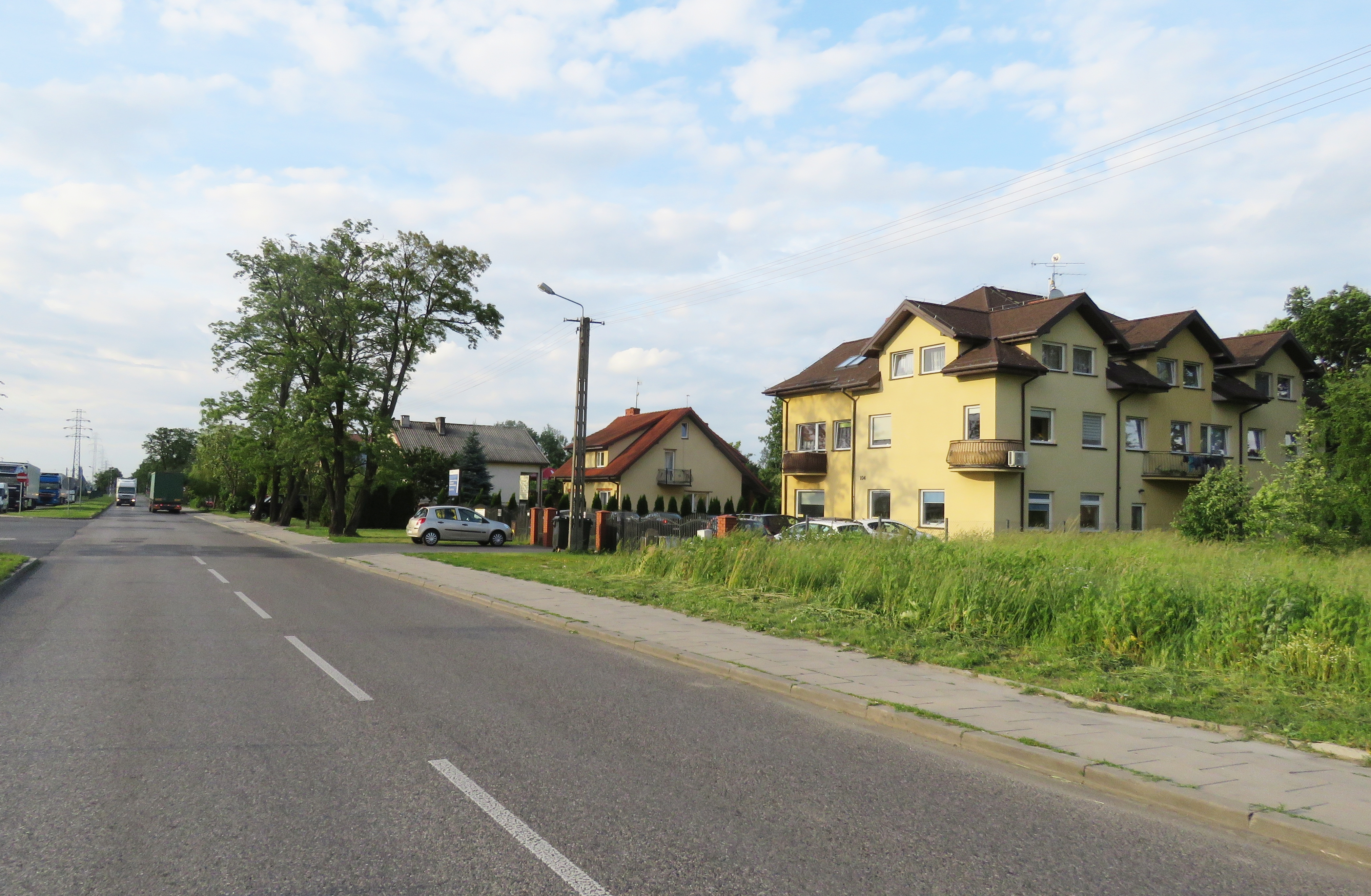 Teresin Gaj